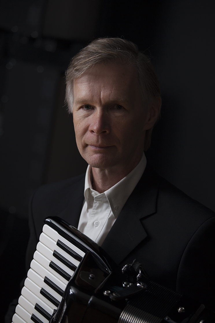 Tiit Kalluste